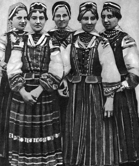 Дамачаўскі строй. Святочныя ўборы дзяўчат і маладых жанчын. Вёска Чэрск. Брэсцкага раёна. 1910-я гады